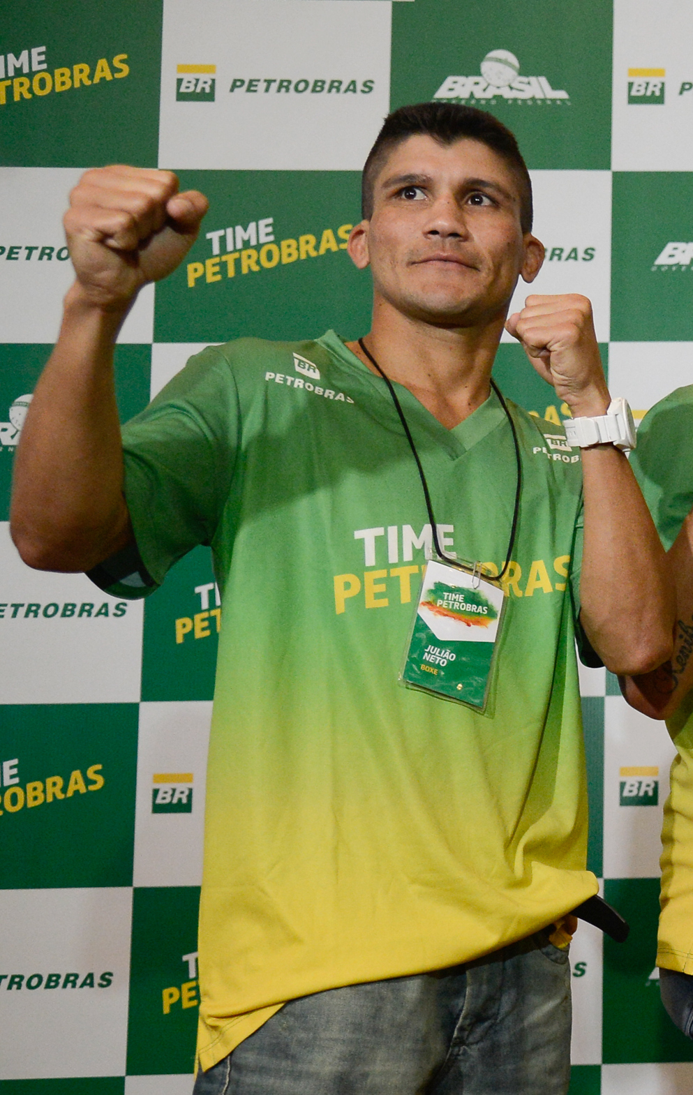 Rio de Janeiro - Atletas olímpicos que representam o Brasil nos Jogos Rio 2016 patrocinados pela Petrobras (Fernando Frazão/Agência Brasil)